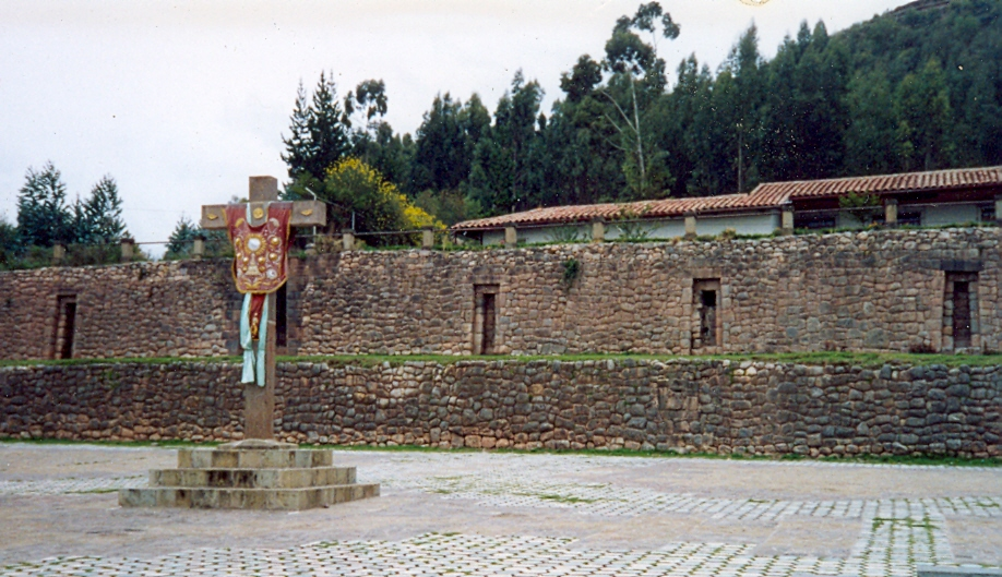 Muro lateral del Palacio de Colcampata, Parroquia de San Cristóbal (Cuzco)